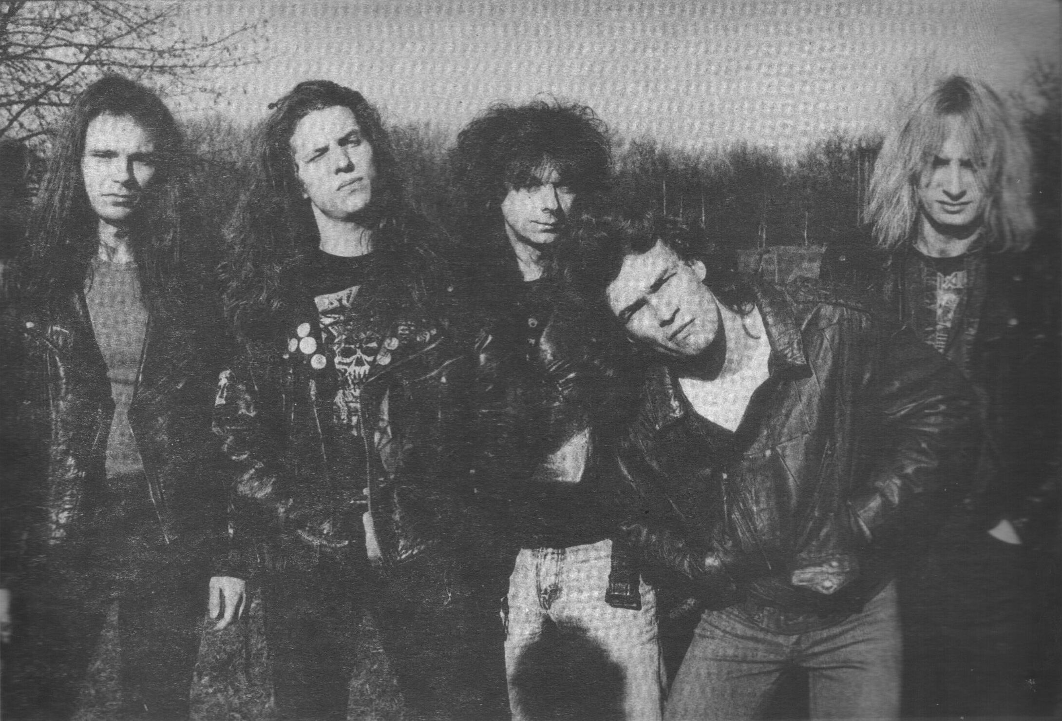 Grupa heavymetalowa Turbo, około 1990 roku